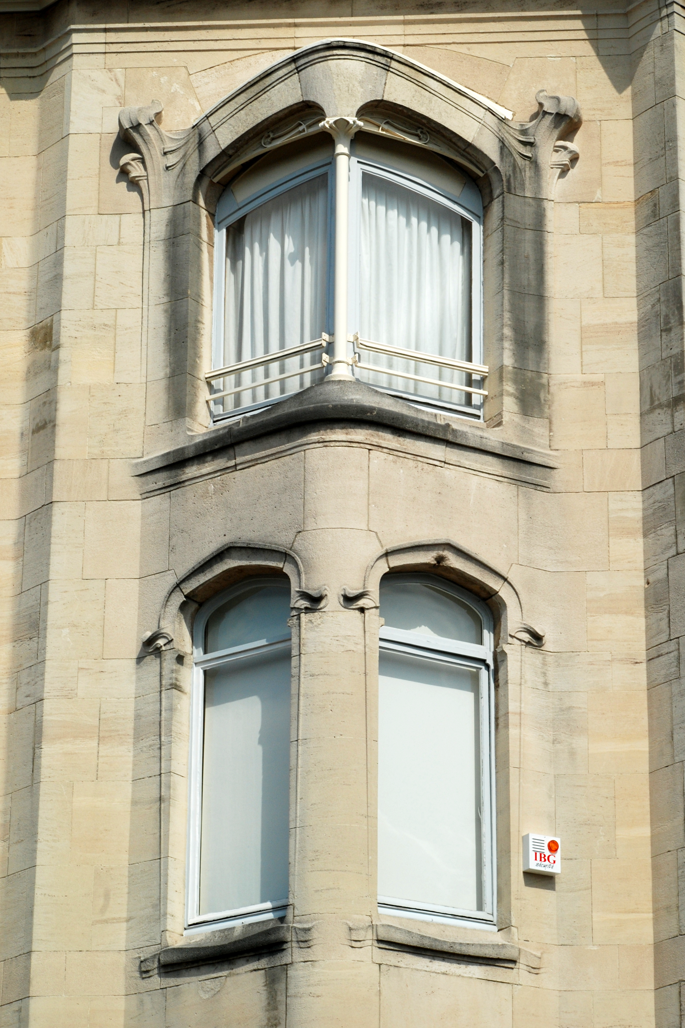 Belgique - Bruxelles - Hôtel Van Eetvelde (Art nouveau - Victor Horta - 1895)